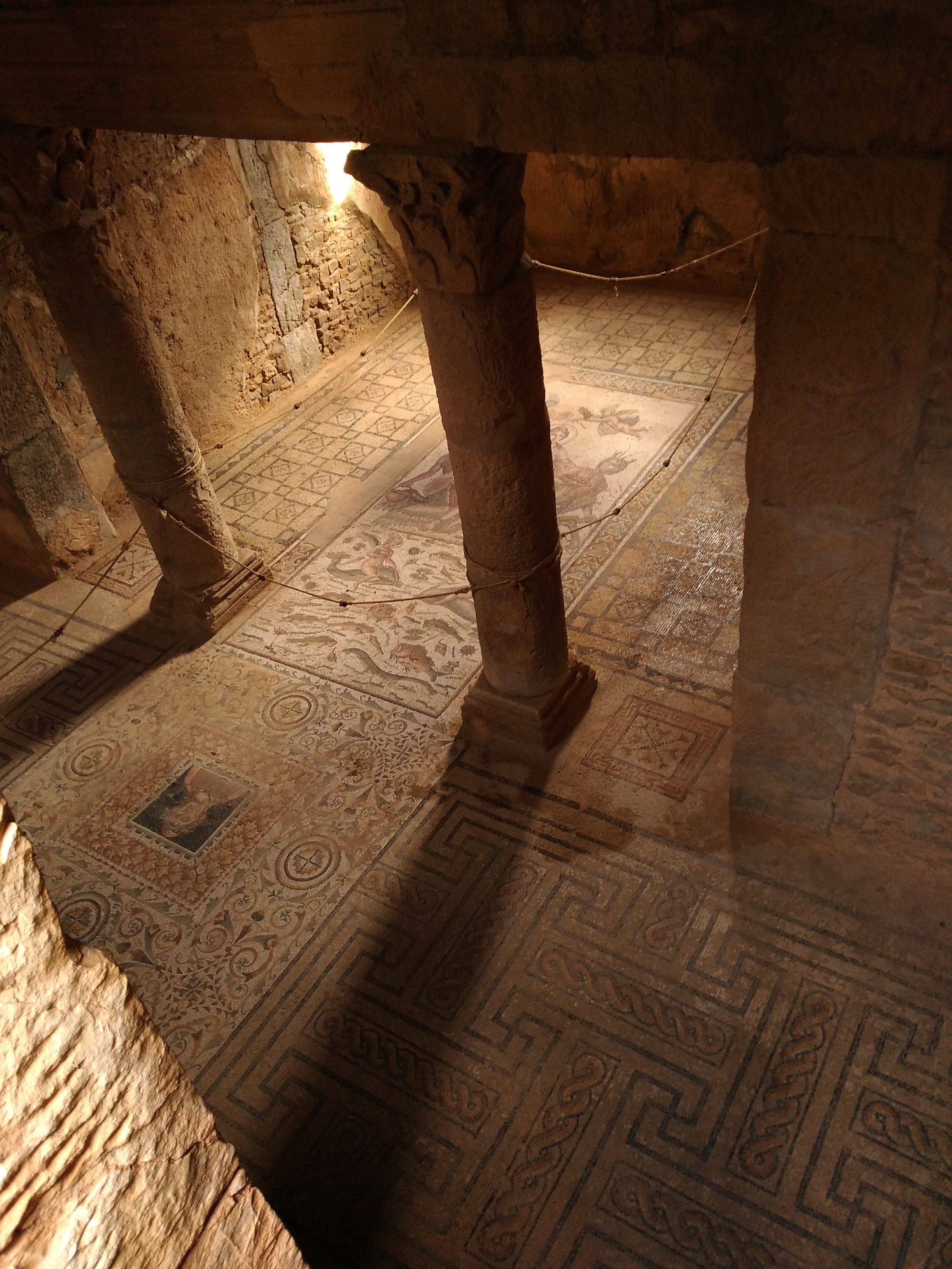 Maison d'Amphitrite, Bulla Regia